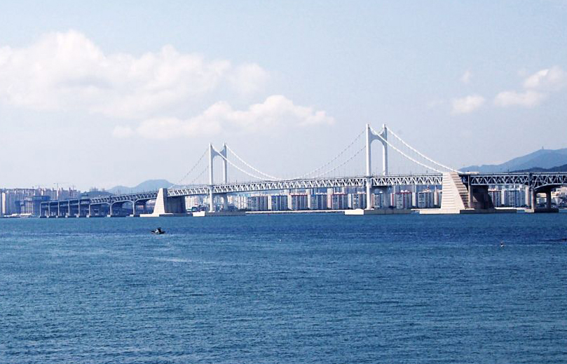 Gwangan Bridge, Busan, South Korea